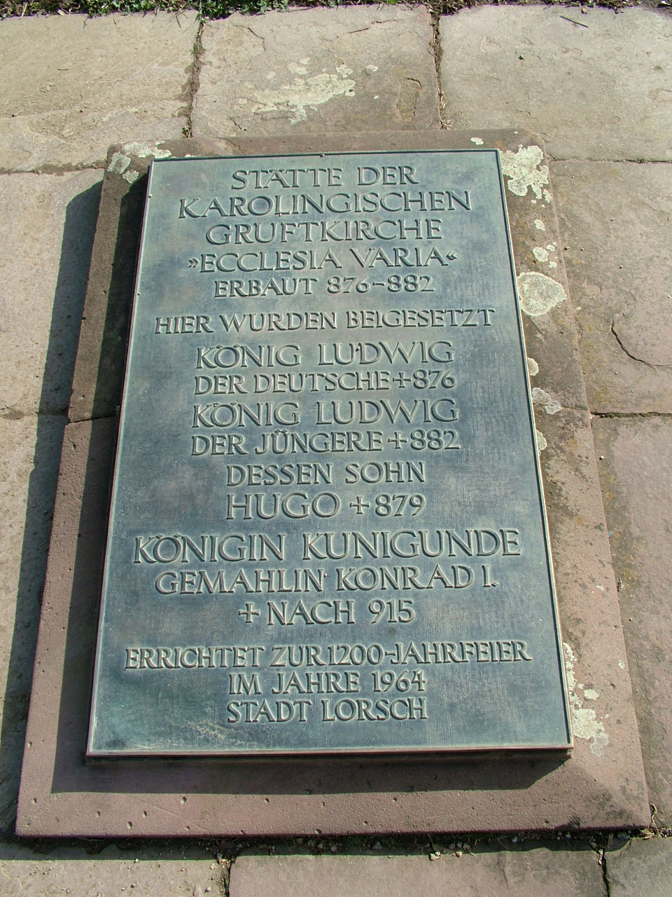 Gedenktafel von 1964 an der Stelle der einstigen Ecclesia varia in Lorsch